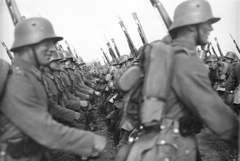 Die grosseReichswehrparade vor dem Reichspräsidenten von Hindenburg in Römhild in Thüringen! Blick in die 50 m lagen Reihen der Reichswehr während der Parade vor dem Reichspräsidenten von Hindenburg.